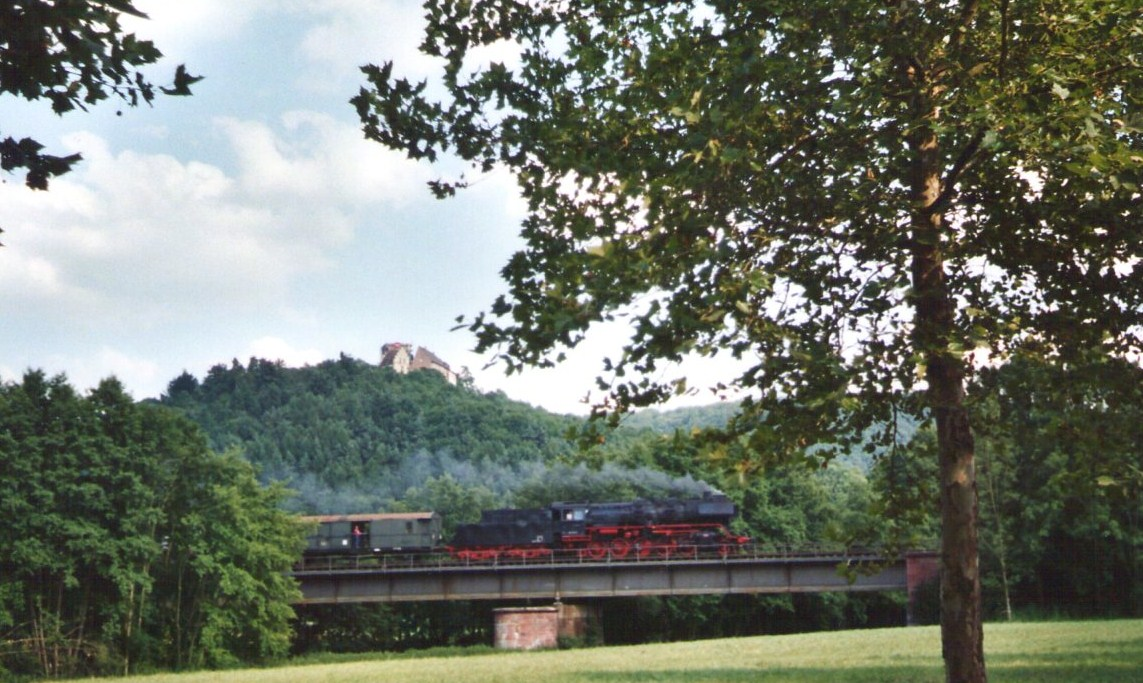 Eisenbahnbrücke Bahnhof Gamburg (Tauber) Bahnbrücke über die Tauber und die L 506. Mit Dampsonderzug. Im Hintergrund Burg Gamburg.